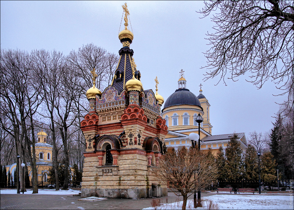 Гомель. Капліца-пахавальня і сабор